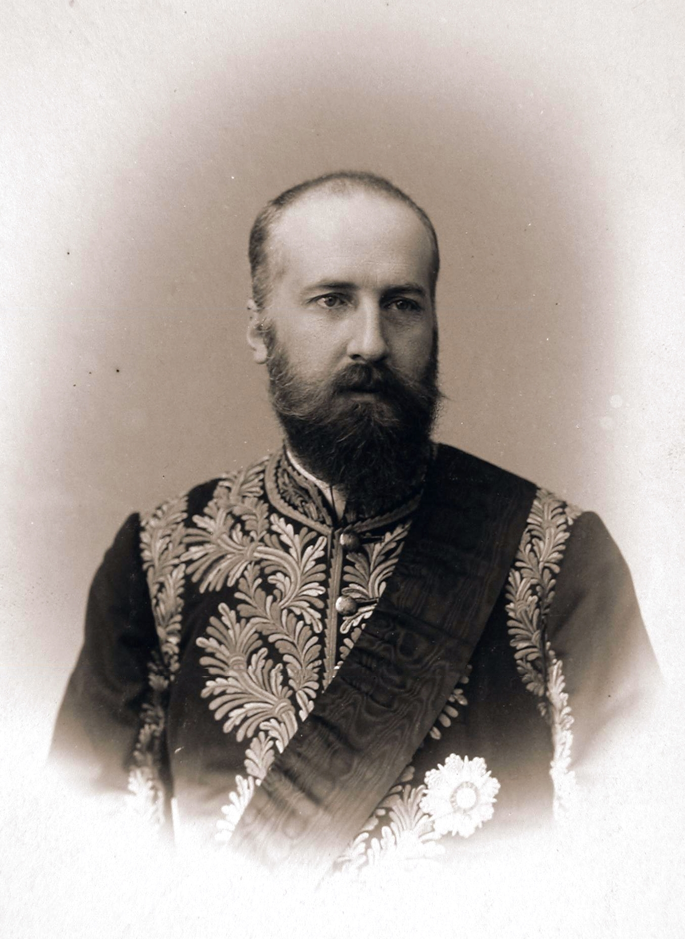 Franz I von Liechtenstein. Russia, Saint-Petersburg, 1894-1898